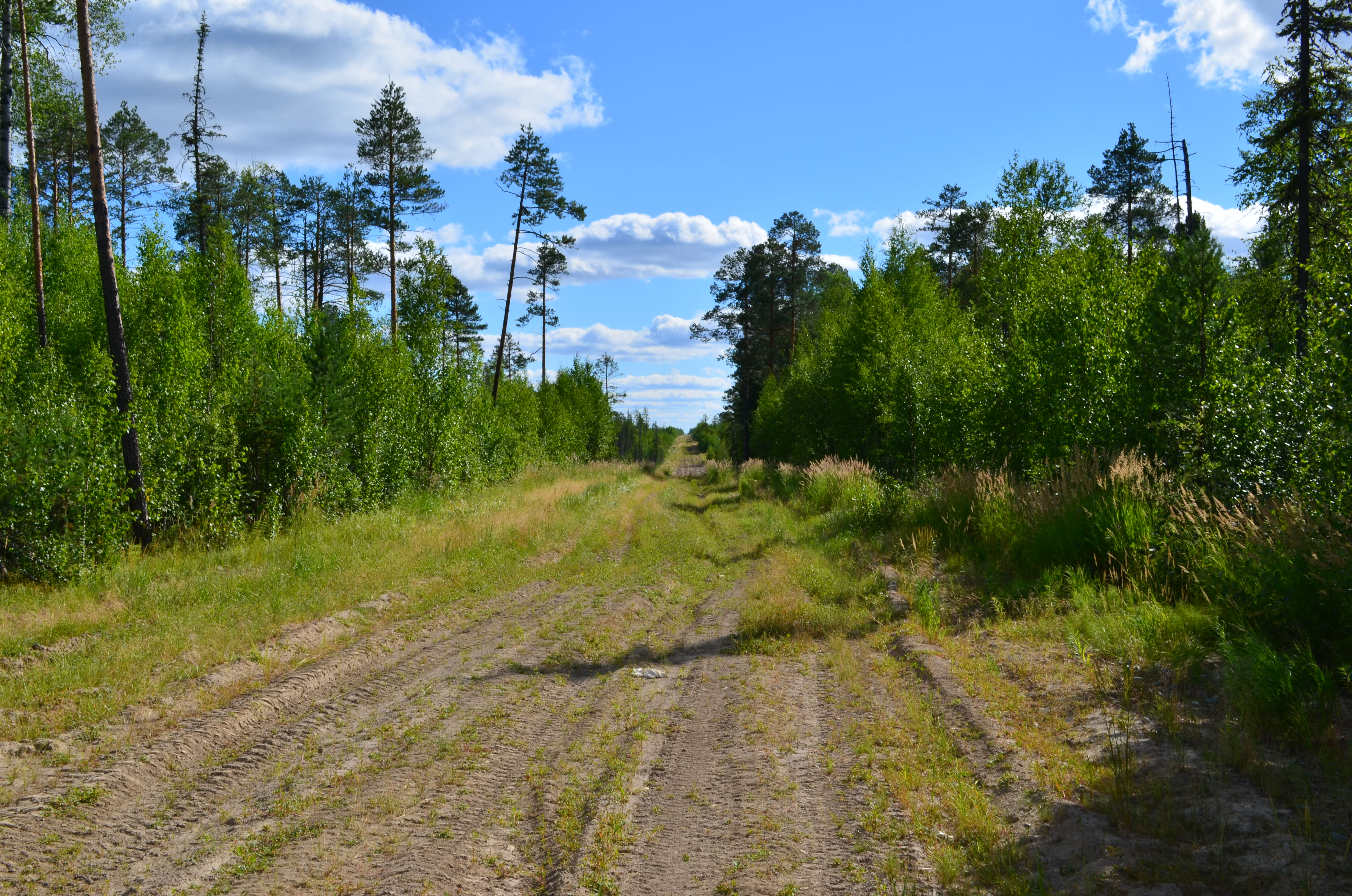 Дорога на карьер